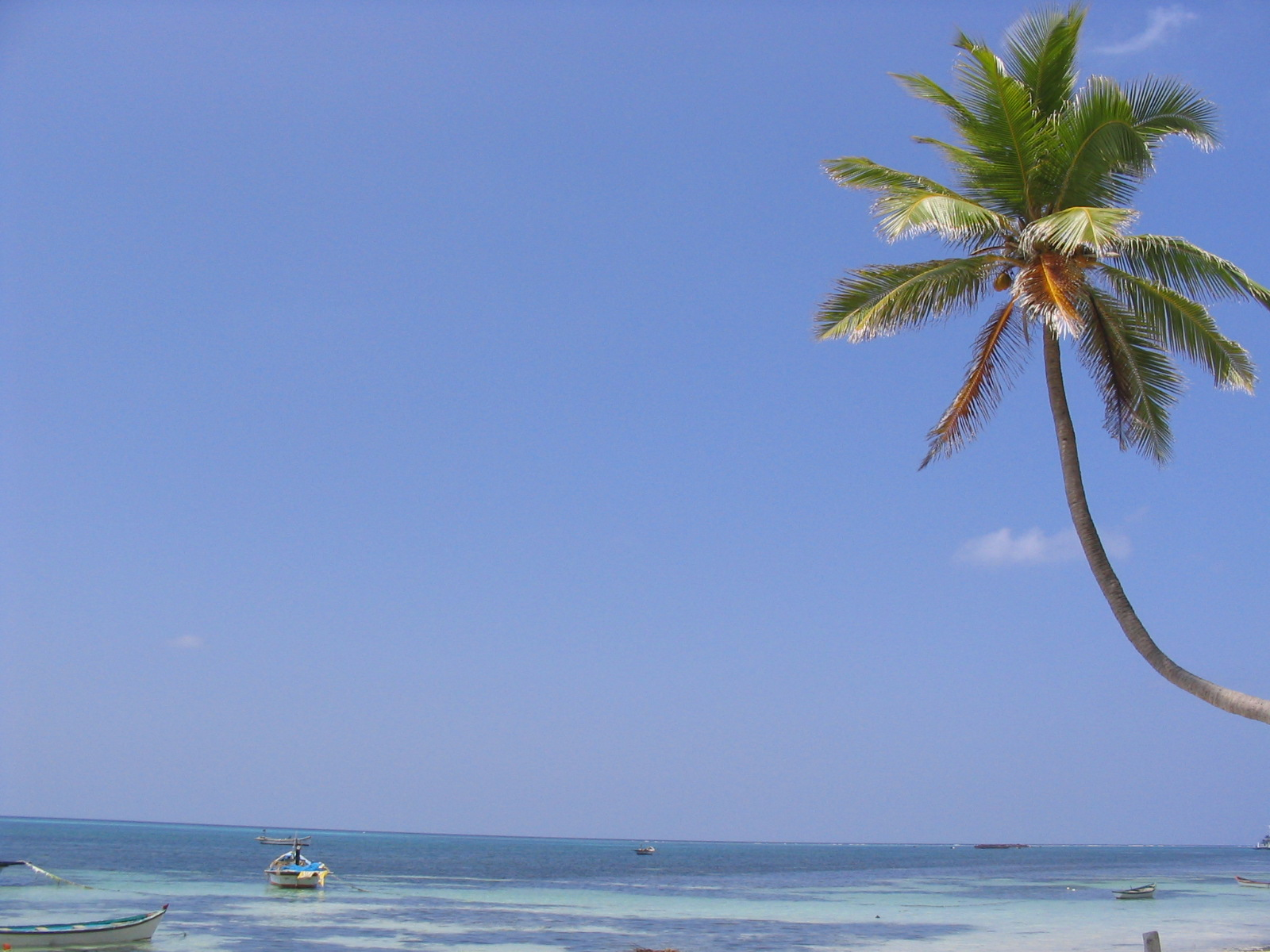 Taken in lakshadweep in feb 2005.